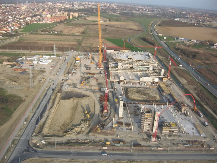 Gradilište Portanove u Osijeku